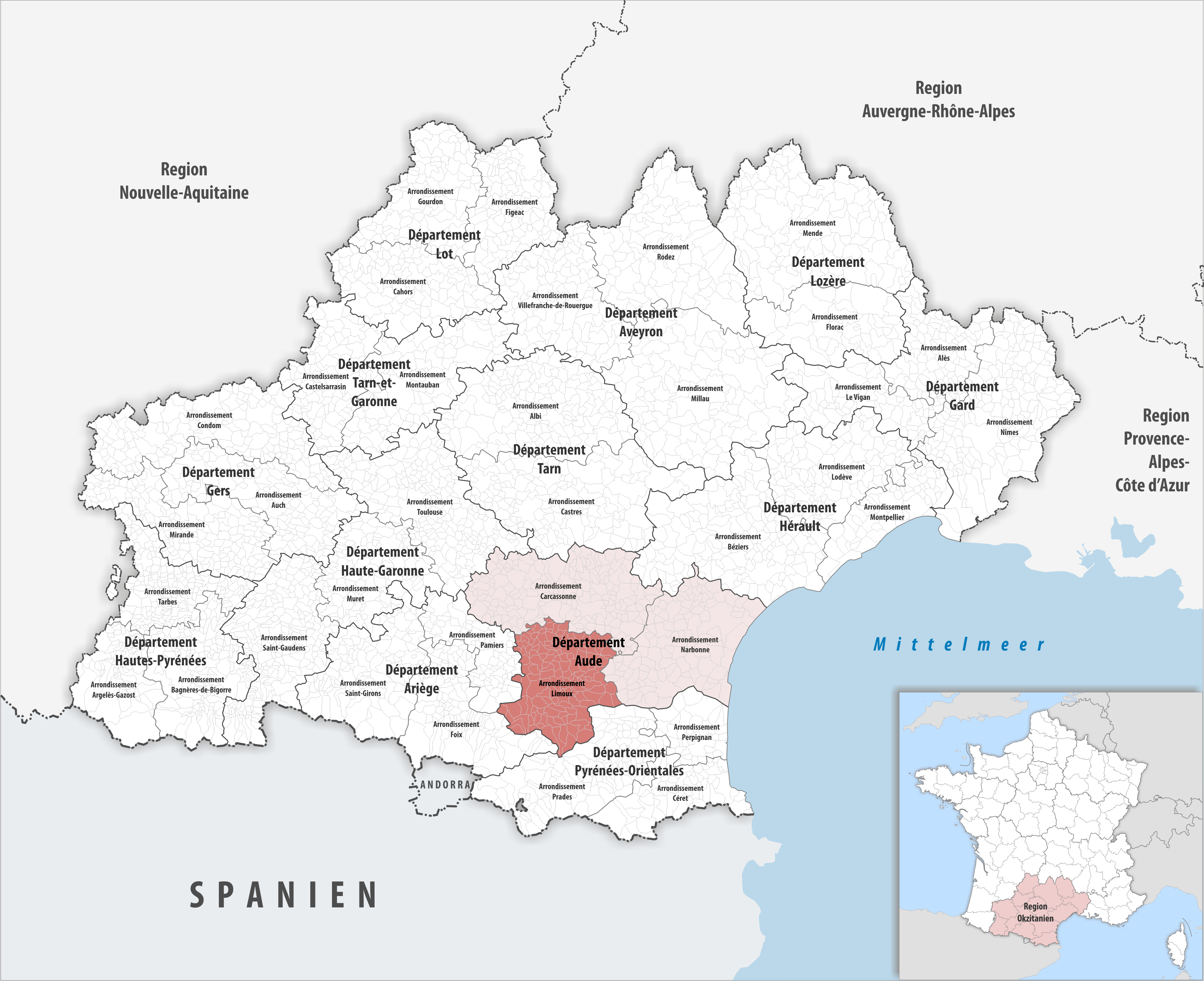 Lage des Arrondissements Limoux